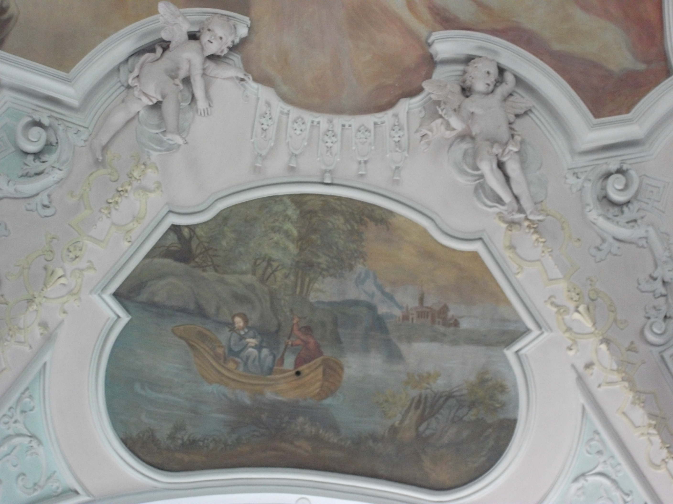 Barocke Stuckaturen an der Decke